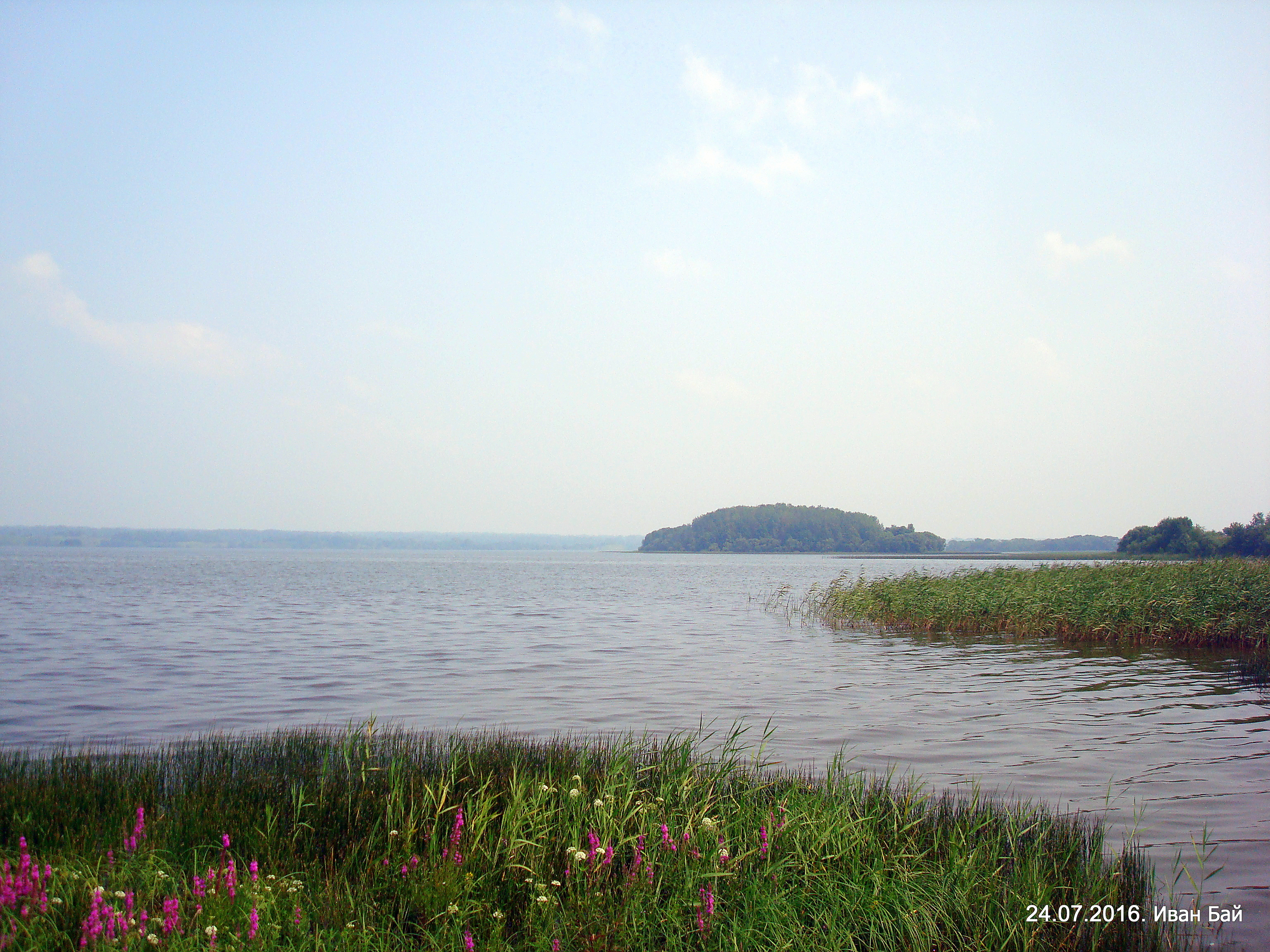 Озеро Езерище